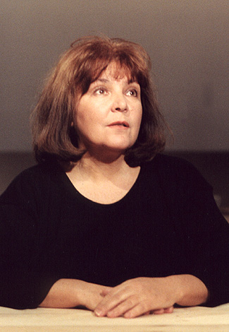 Marta Lipińska w roli Alicji - "Odwrót" Williama Nicholsona w reżyserii Marcina Englerta